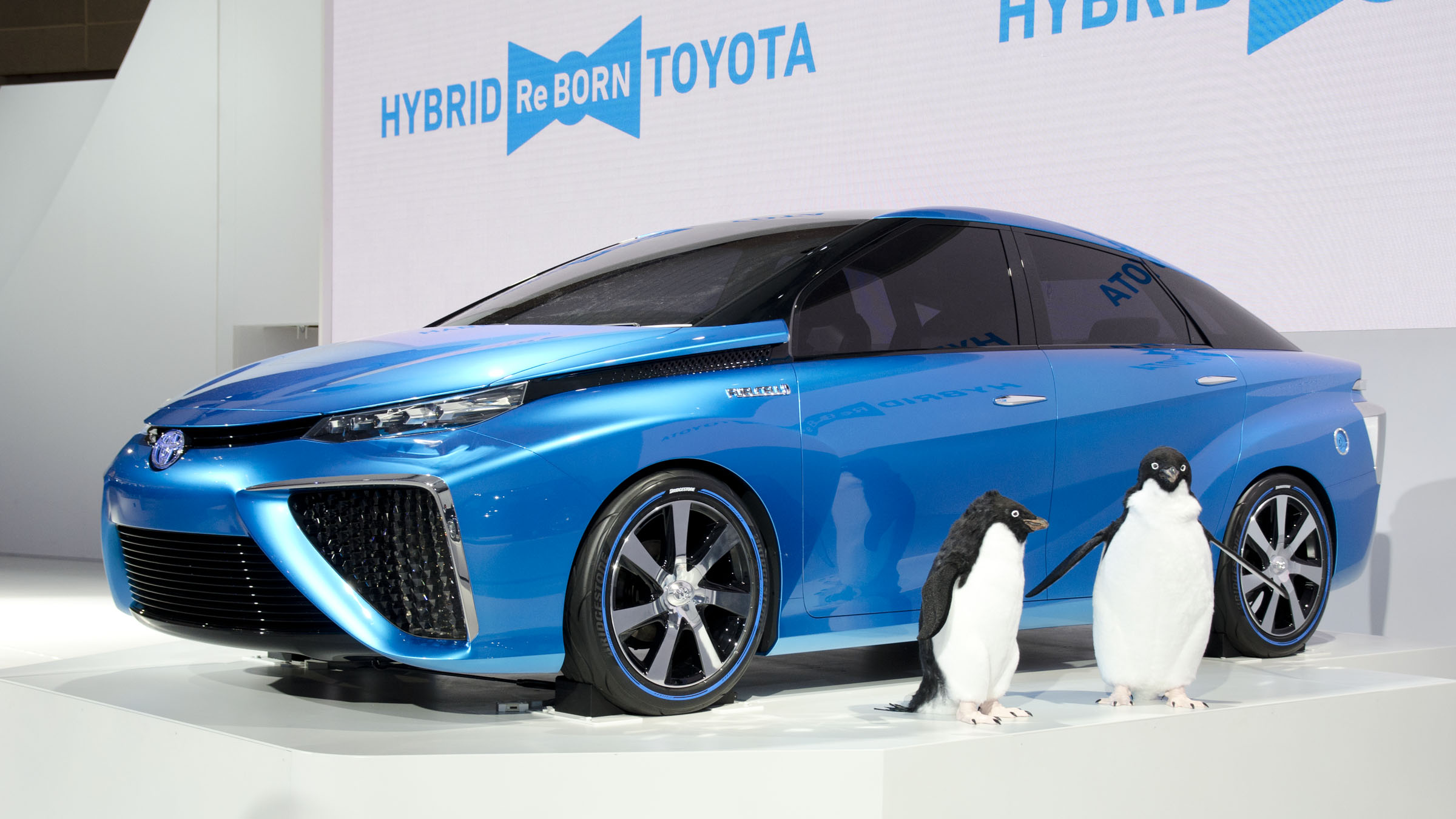 トヨタ FCV CONCEPT （第43回 東京モーターショー）